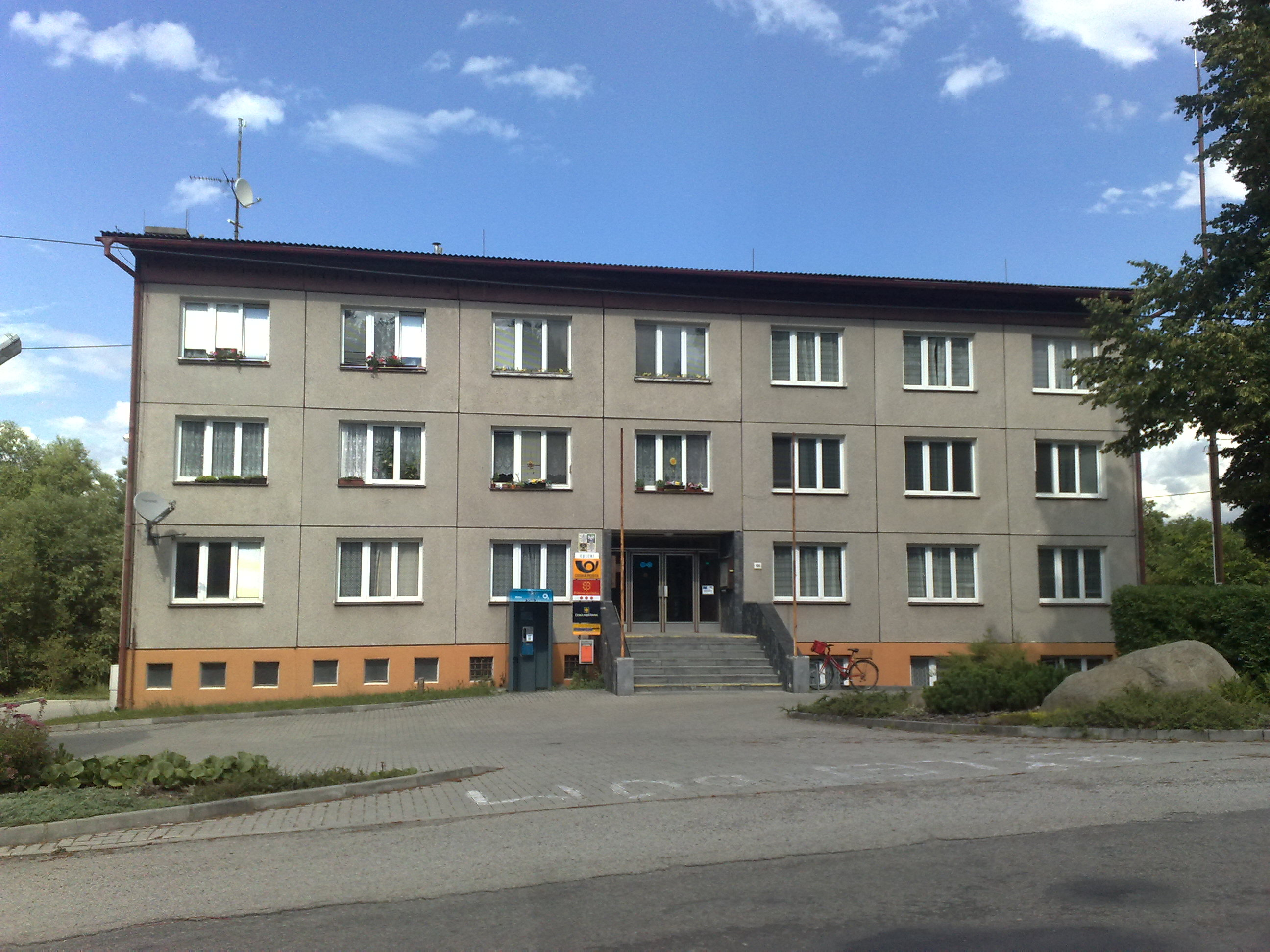 Fotografie z obce Pačejov nádraží